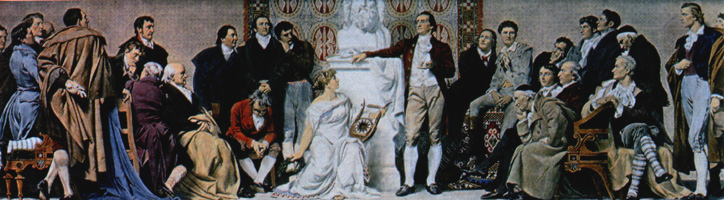 Goethe (Mitte) mit den Brüdern Humboldt, Wieland, Niebuhr, Schleiermacher, Herder, Gauss, W. von Schlegel, Iffland, Schiller, Klinger, Tieck, Jean Paul, Pestalozzi u.a. - Druck, spätere Kolorierung, nach dem Gemälde von Otto Knille, 1884